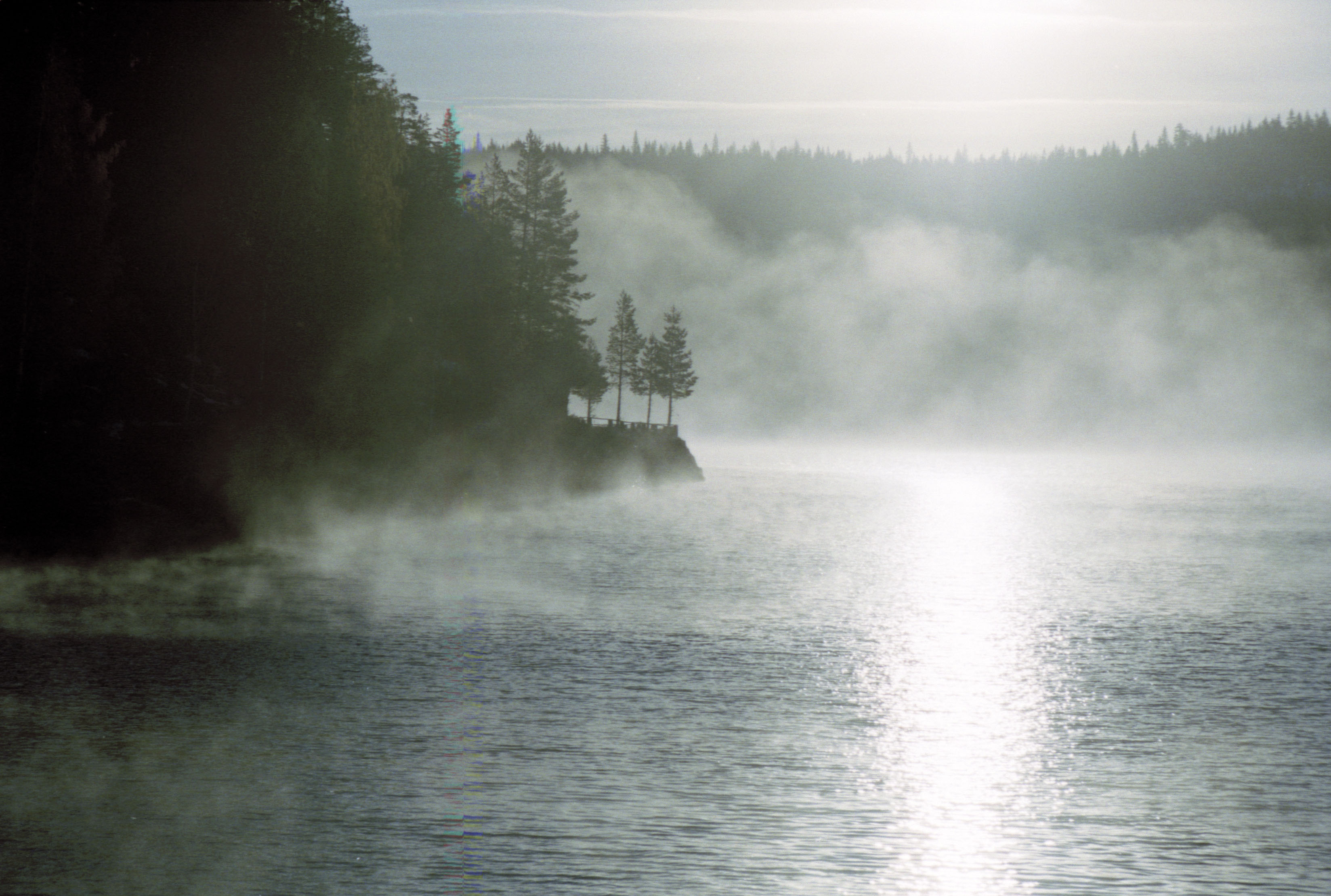 Indalsälven i dimma vid stadsberget Krångede.